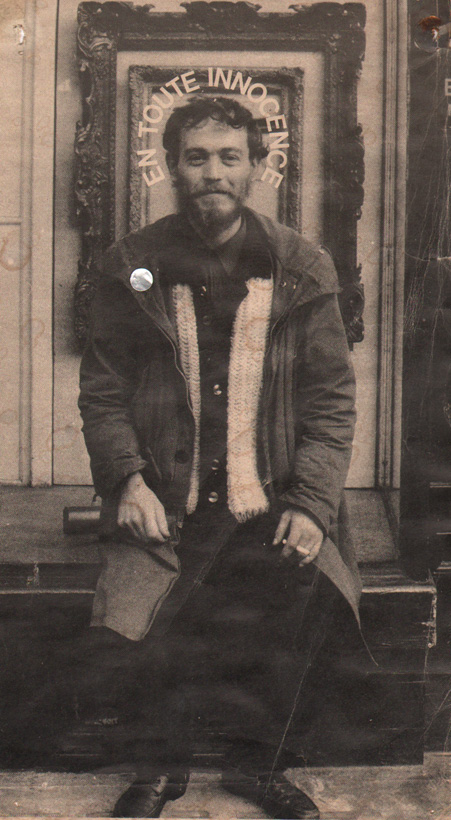 "En toute innocence. Portrait du graveur Dacos photographié par Pascal Poucet à Londres en 1968.